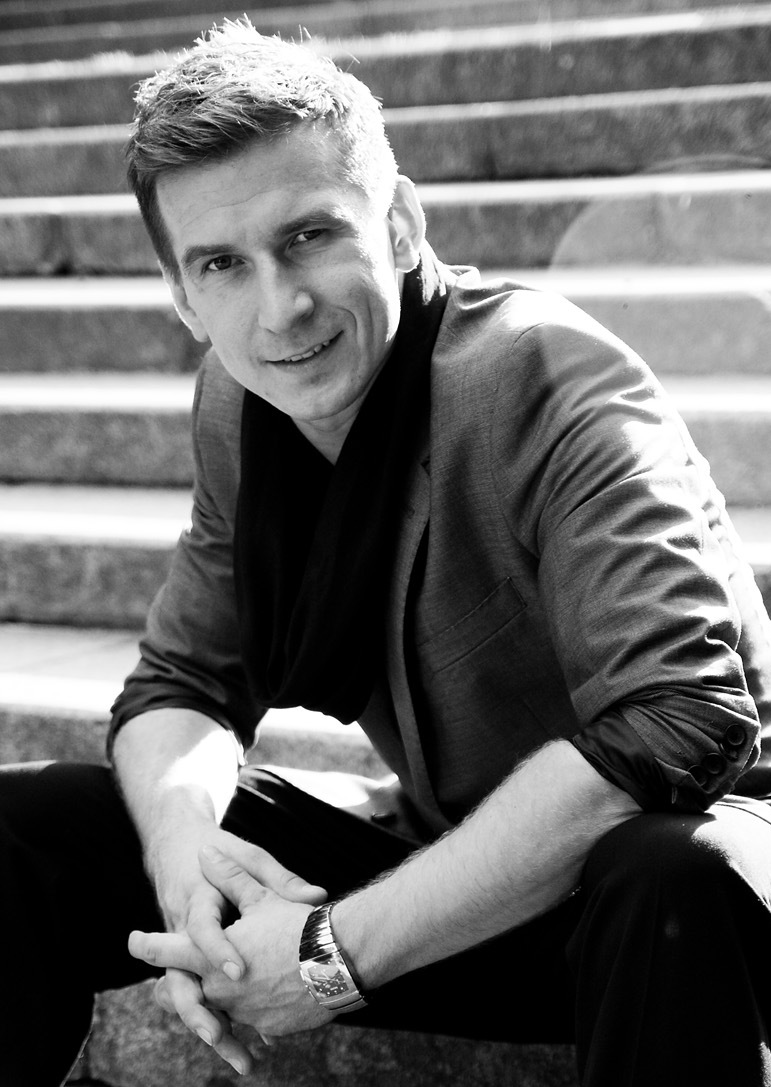 Tomasz Barański, polski tancerz zawodowy i choreograf. Zdjęcie jest częścią prywatnej sesji zdjęciowej wykonanej w 2010 w Warszawie przez fotografa Tomasza Malinowskiego.